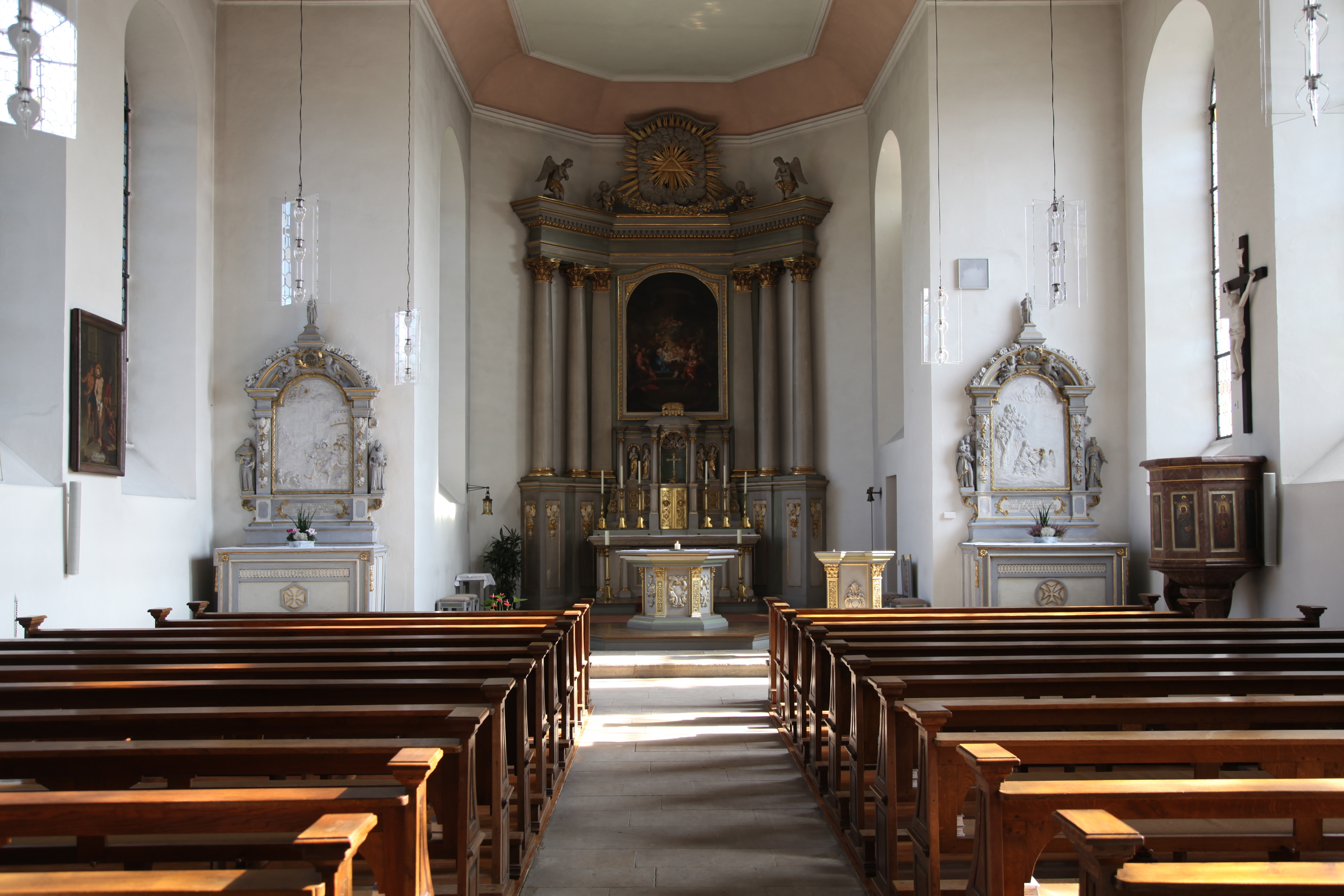 St. Johannes Baptist, Alter Fährweg in Gimbte, Greven